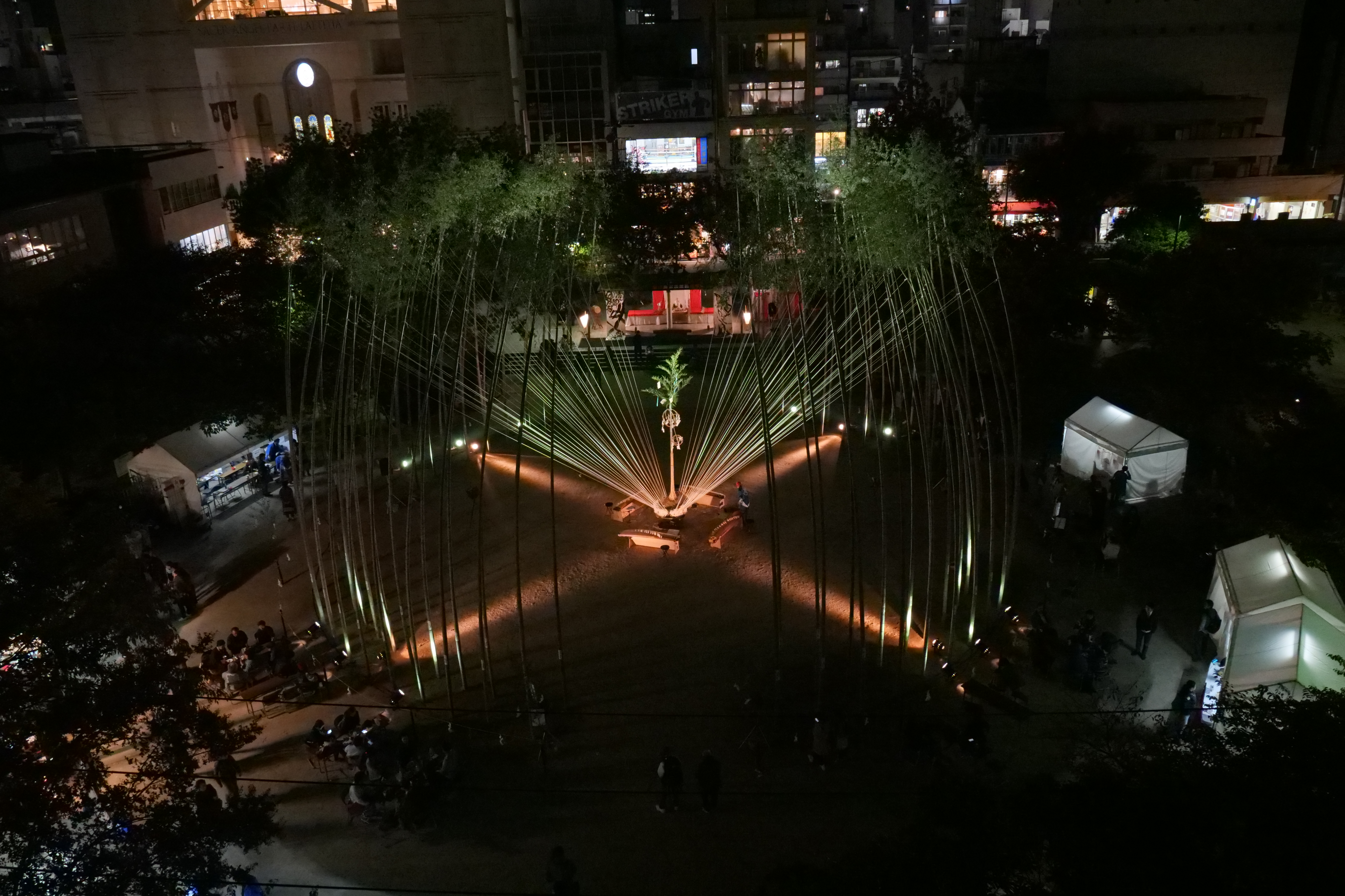 大イノコ祭りの一日目夜。1.5tの大石を88本の竹の張力で浮かせる。広島市中区の袋町公園にて。 Panasonic Lumix DC-G9